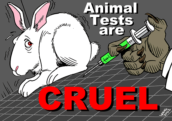 Animal tests are CRUEL